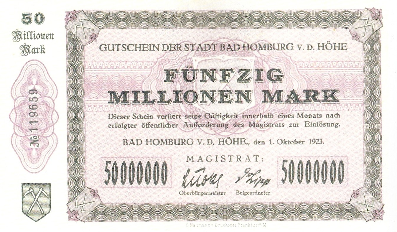 Notgeld 50 Millionen Mark aus Bad Homburg (1923)